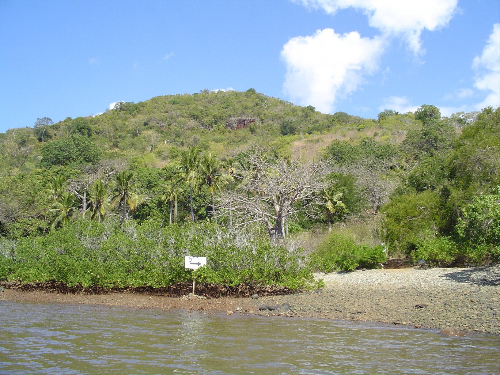 Ilôt Mbouzi (Mayotte)